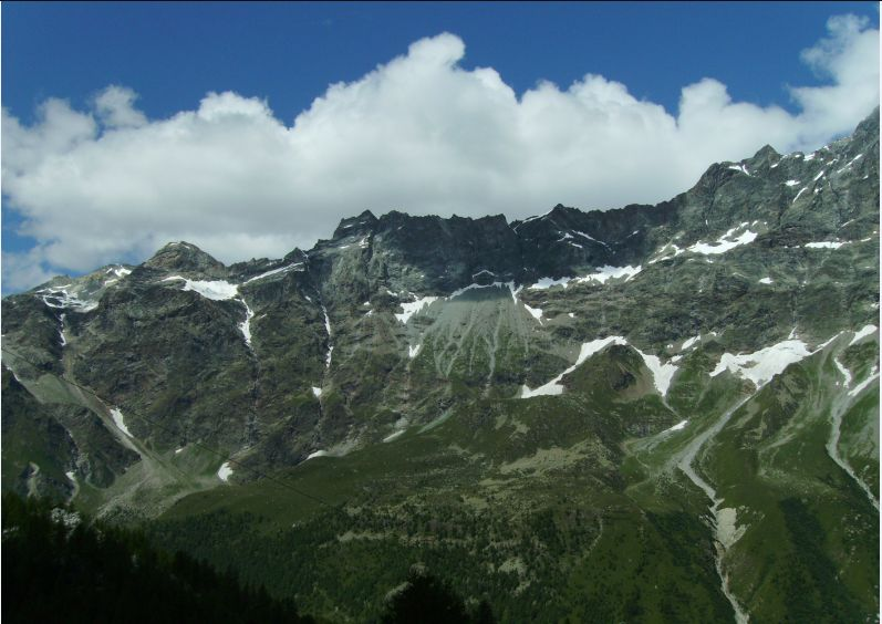 Le Petites Murailles dal versante della Valtournanche